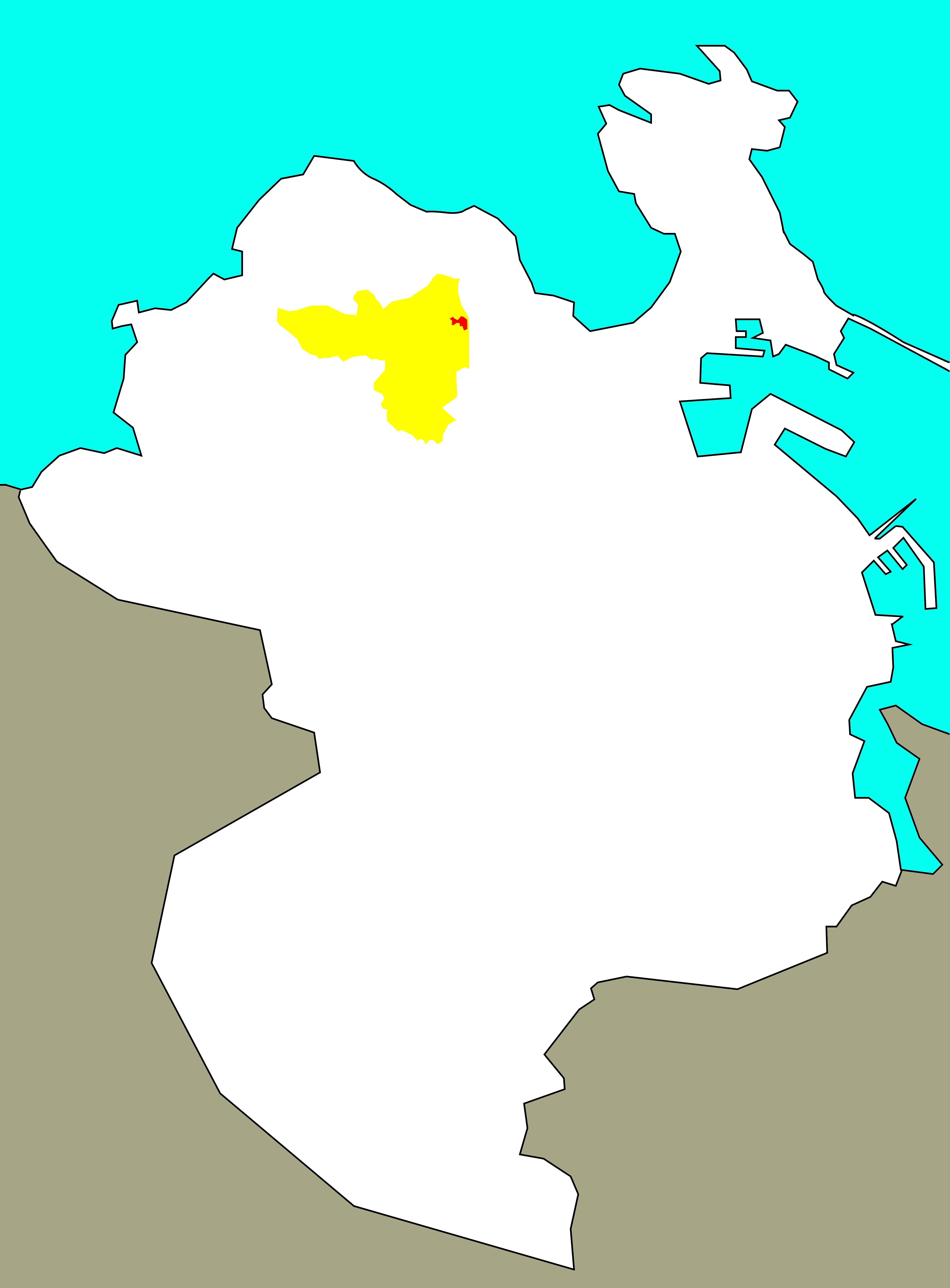 Situación das Bouzas no "barrio-territorio" de San Pedro de Visma.[1]